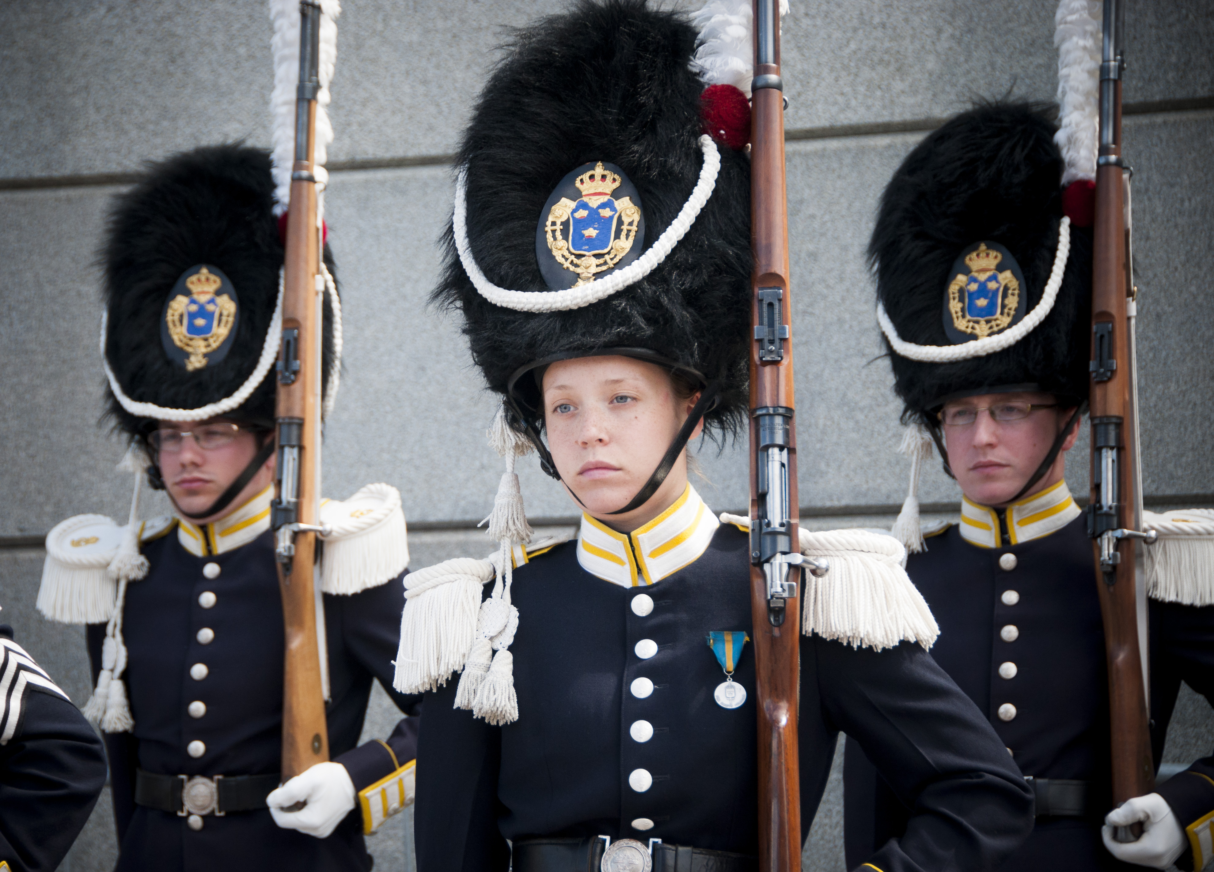 Grenadjärvakt ur Livgardet på Madeleines bröllop